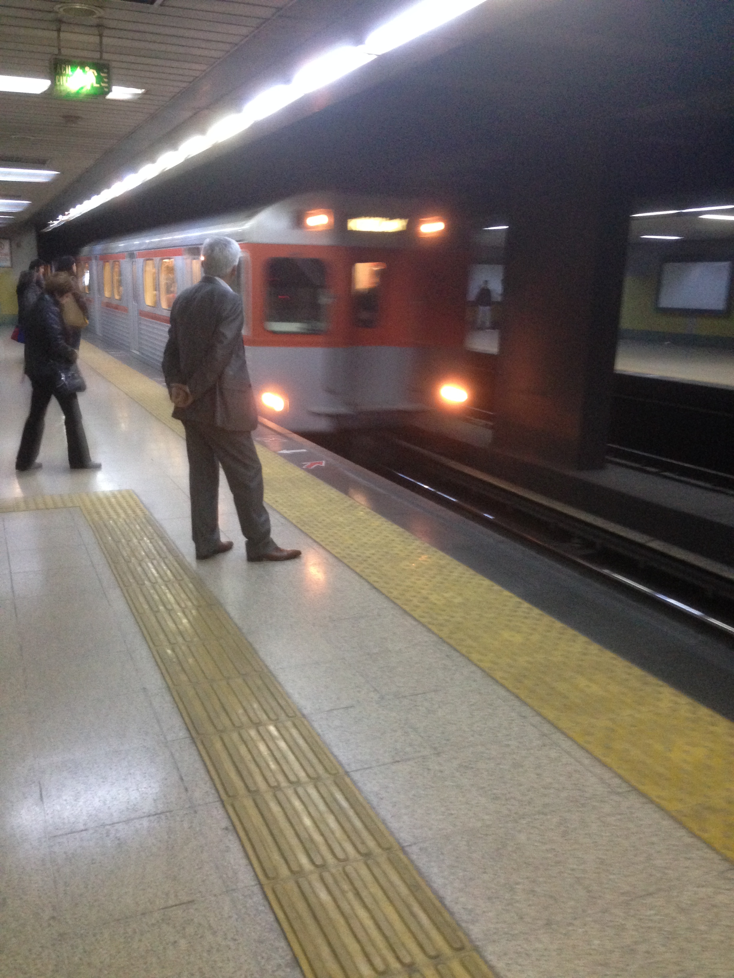 Batıkent metrosundan bir görüntü